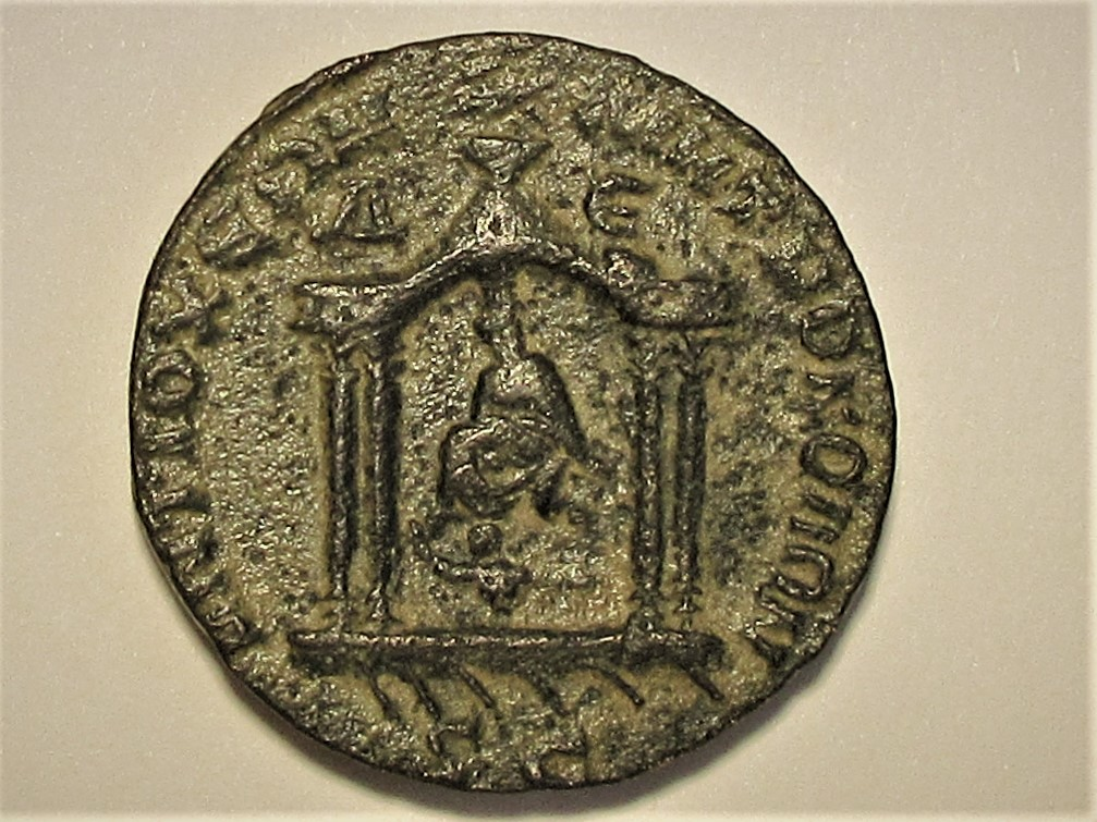 Tychetempel in Antiochia mit Flussgott Orontes zur Füßen der Tyche, 8 Assariamünze, z.Zt. Volusianus, McAlee 1192/3